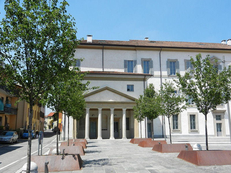 Gorgonzola - Villa Pirola